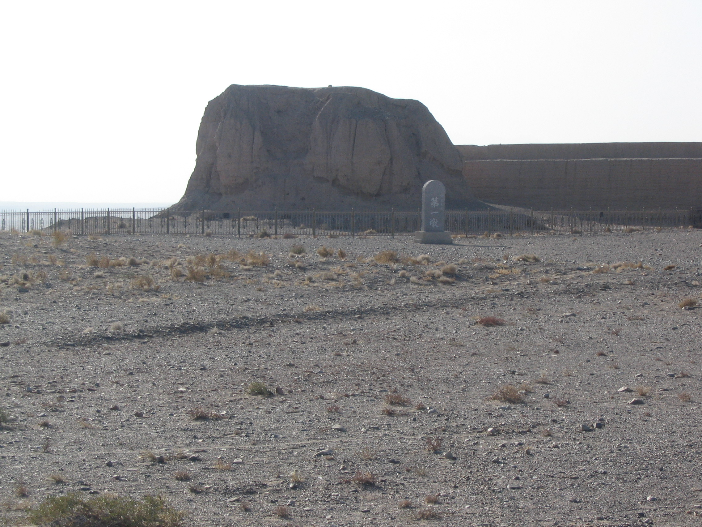 Jiayuguan - Prima torre